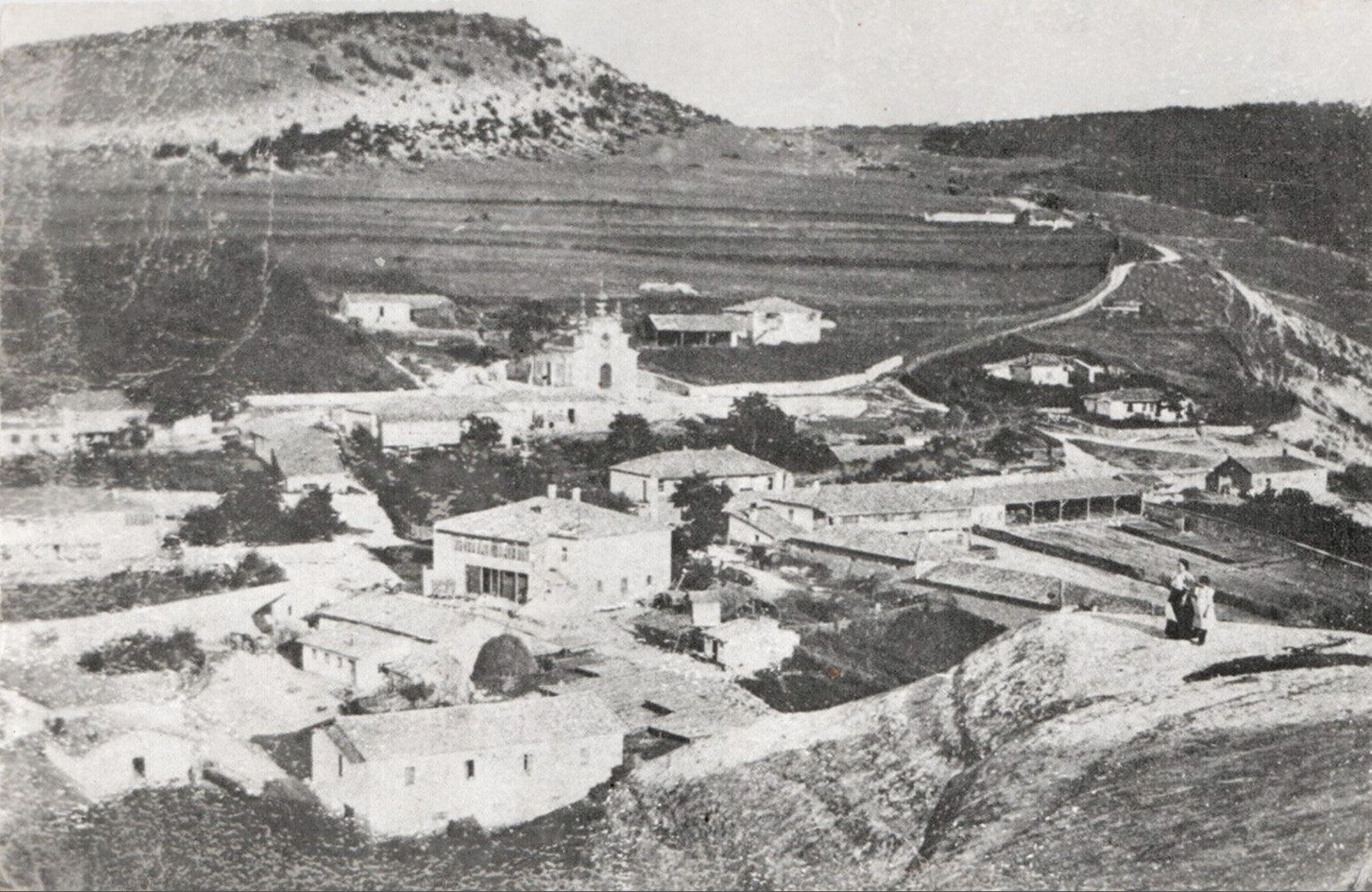 Село Балта-Чокрак, Крым, 1900 год